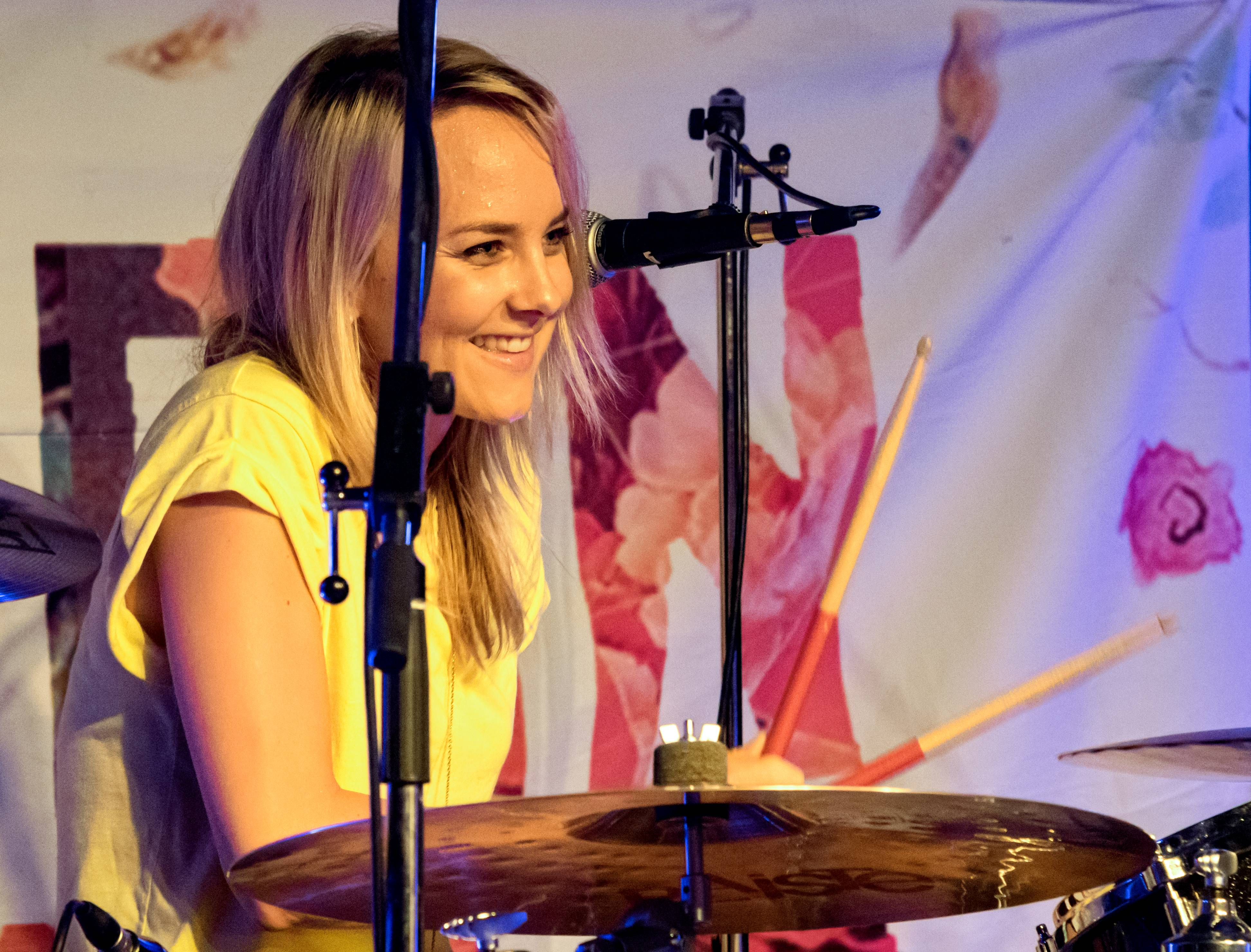 Bilder vom ZMF 2015 Germein Sisters (Australien) Georgia, Singer-Songwriter Ella, Bass/Synthesizer, Backgroundgesang Clara Schlagzeug, Backgroundgesang